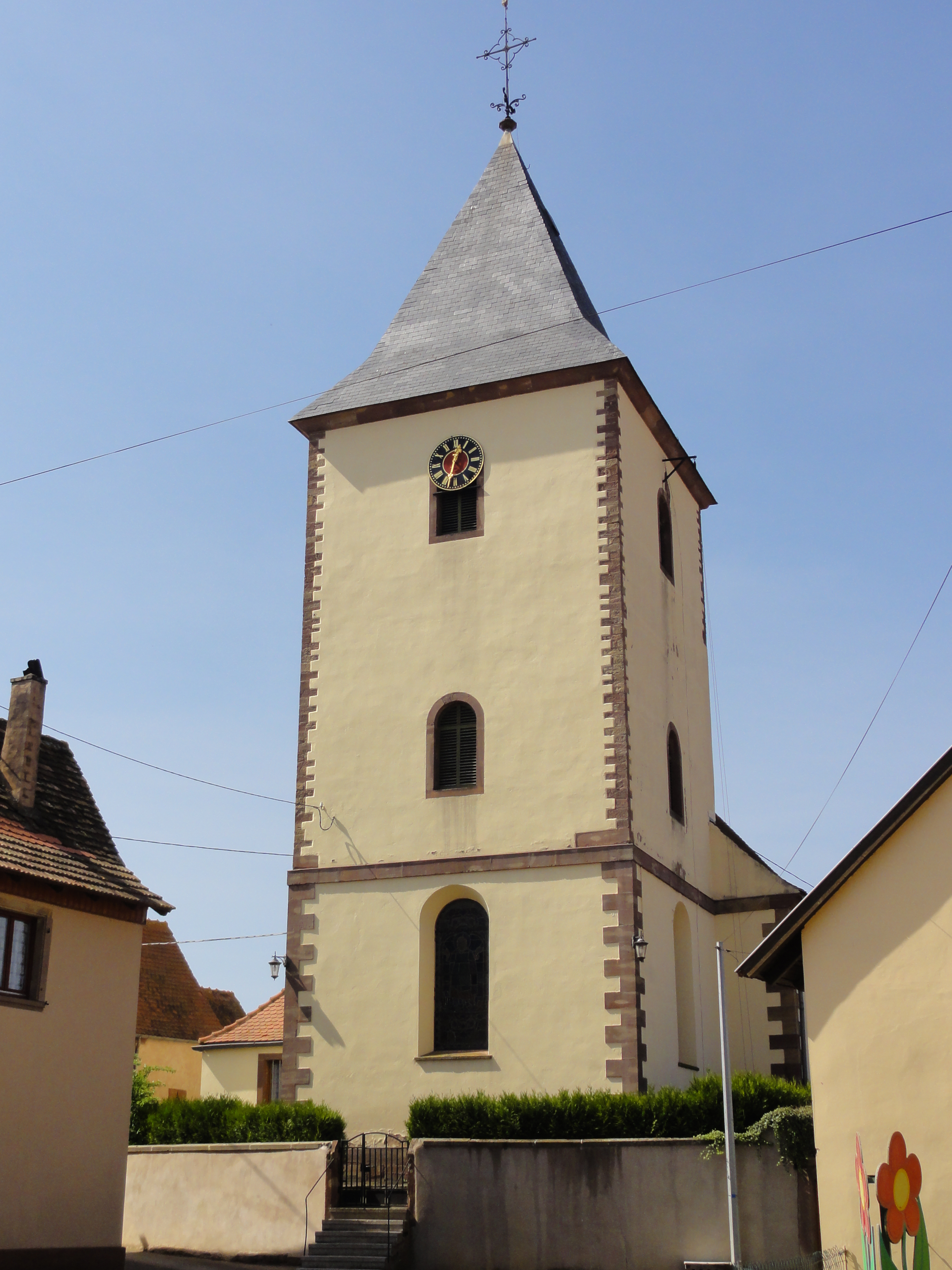 Alsace, Bas-Rhin, Maennolsheim, Église Saint-Vit (XVe-XVIIIe)